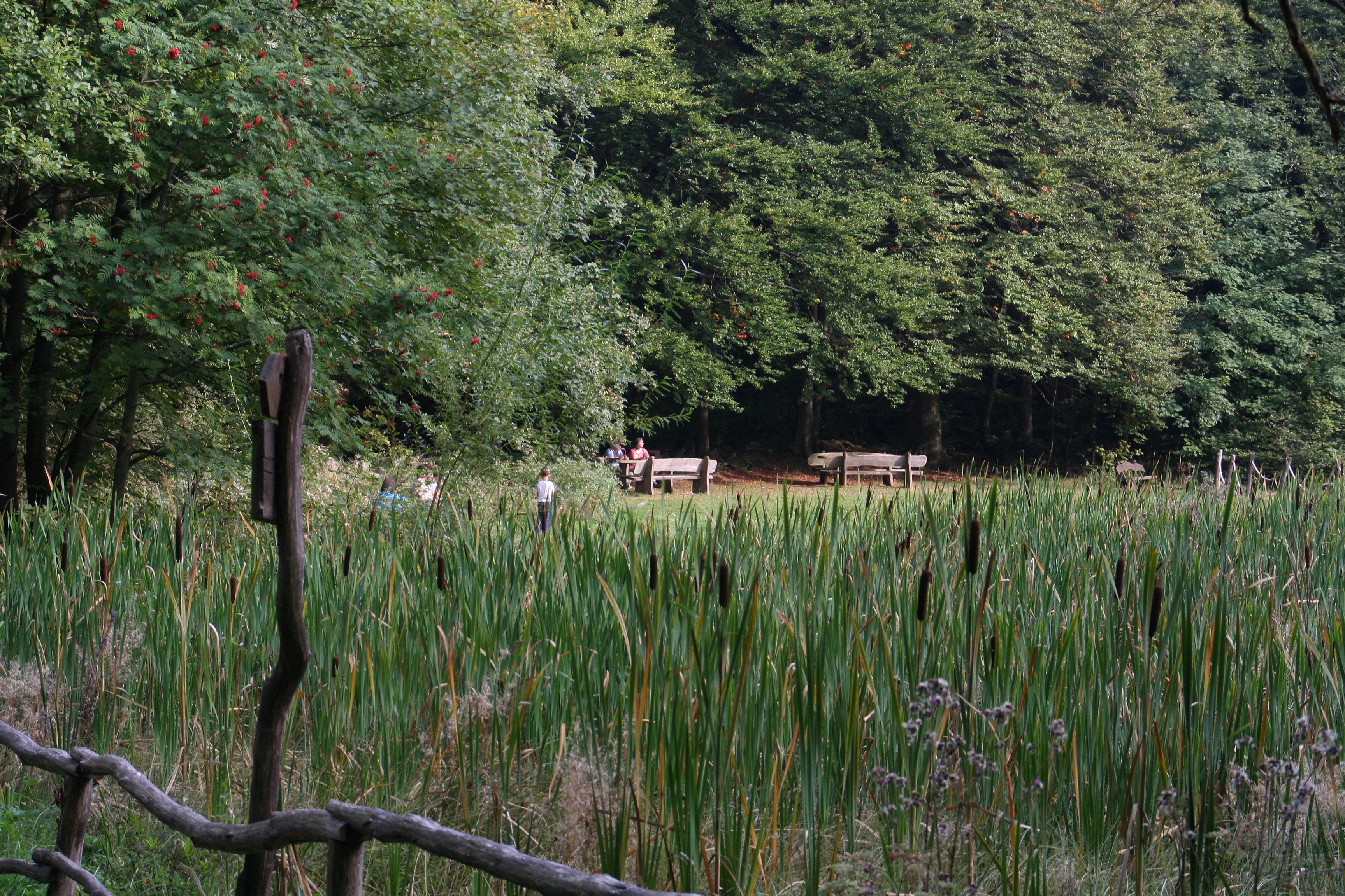 Frau-Holle-Teich auf dem Hohen Meißner